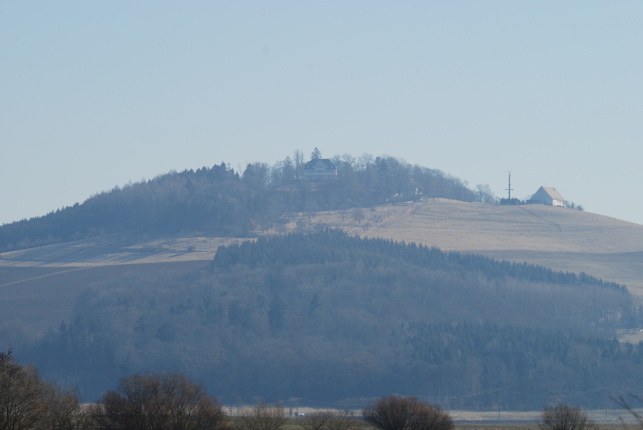 Wartenberg